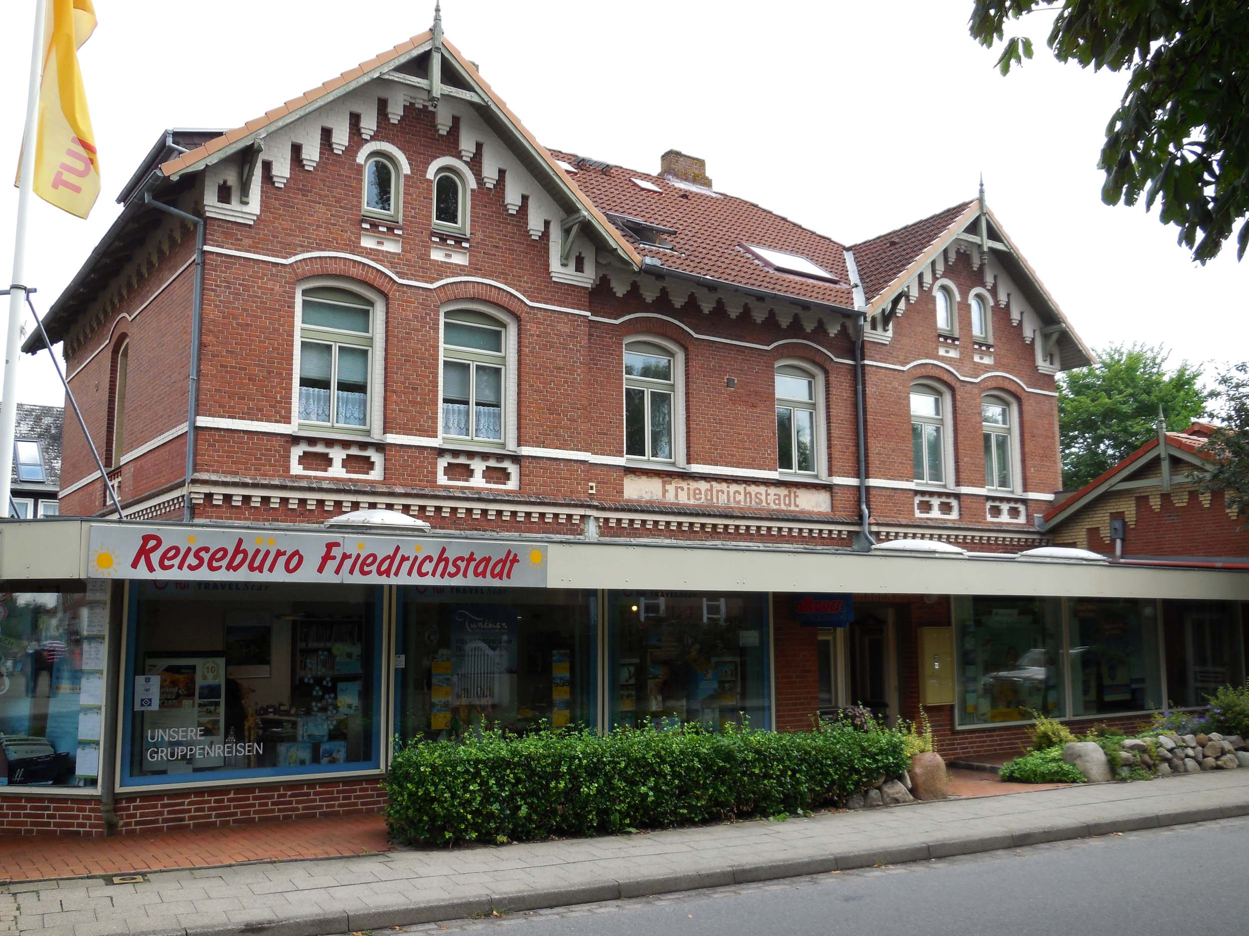 Alter Bahnhof Friedrichstadt der Schleswiger Kreisbahn